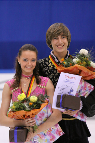 Ekaterina PUSHKASH and Jonathan GUERREIRO (RUS) at the 2009-2010 JGP Pokal der Blauen Schwerter.